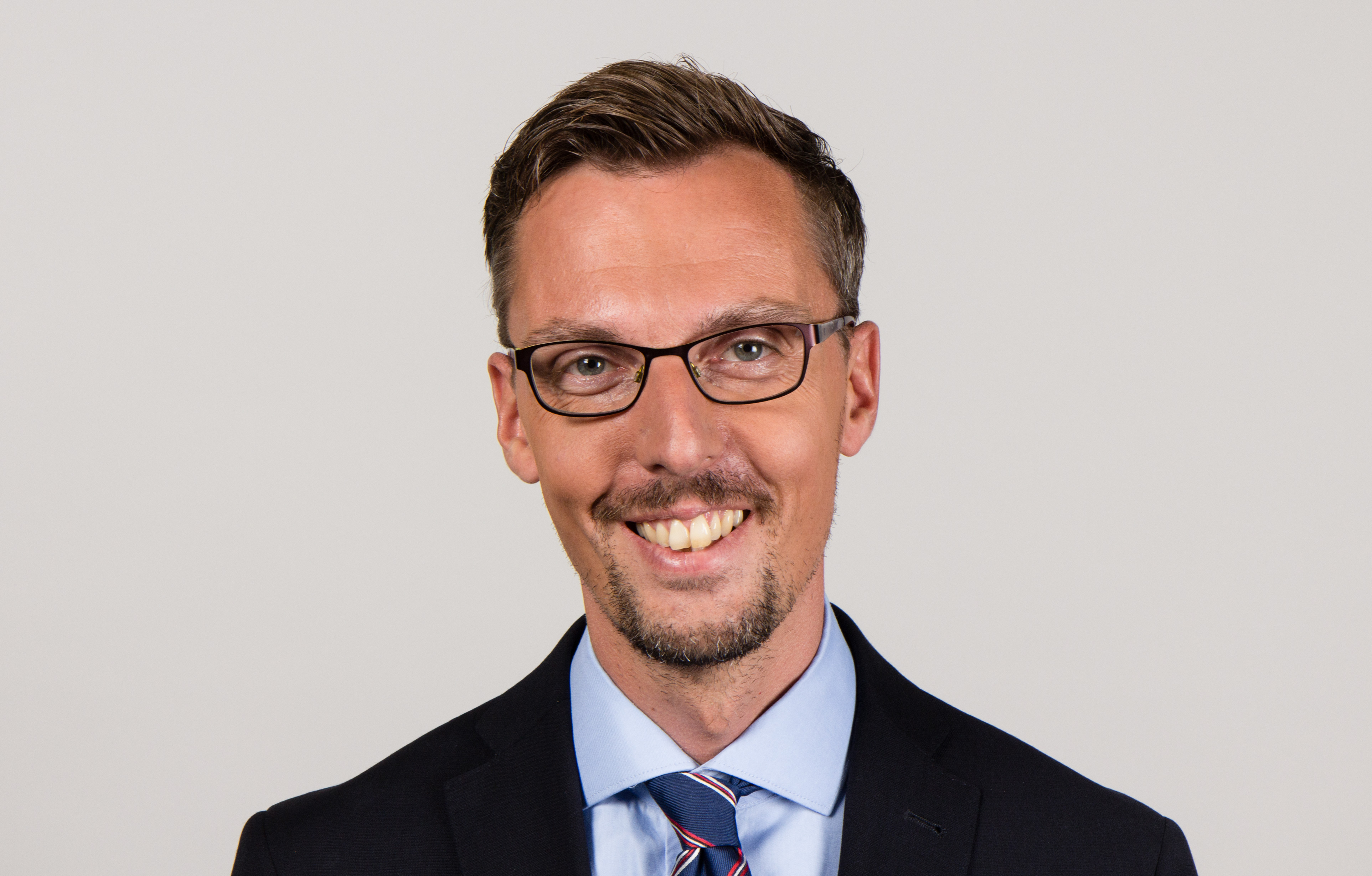 Lars Castellucci * 24. Februar 1974 in Heidelberg) ist ein deutscher Politiker (SPD). Wikipedia-Bundestagsprojekt 2014 8–12 September 2014 in BerlinThis file was taken during the project “Wiki loves parliaments/Bundestag 2014” (German). Organisation: Martin Rulsch, Olaf KosinskyDesign: Martin KraftPhotography: Foto-AG Gymnasium Melle (Jan-Kristof Blömke, Lukas Eismann, Moritz Kosinsky, Laura Lessing, Karsten Mosebach, Mascha Mosebach, Teresa Schreer, Noah Sewöster, Niklas Tschöpe), Olaf Kosinsky, Martin Kraft, Harald Krichel, Steffen Prößdorf, Ralf Roletschek, Martin Rulsch, Gerd Seidel, Sven TeschkeVideo: Marc Rudnick, Manuel SchneiderEditors: Marcus Cyron, Günter Fremuth, Martin Kraft, Robin Krahl, Harald Krichel, Martin Rulsch, WikiAnikaReception: DasMonstaaa, Leonie Rabea Große, Lutheraner, Nina Möllering, Martin Rulsch, WikiAnika, Foto-AG Gymnasium MelleCosmetics: Regina Bosak, Bettina Dieguez, Sandra Kobbe, Andrea Strehlke; Irada Abdullayeva, Vivien Abelmann, Olena Engelbrecht, Sarah Fabini, Nina Magnus, Jacqueline Schmidt, Leonie Taboada, Julia Willer Usage information If you need more information how to use this file, please send an email to . Personality rights warningAlthough this work is freely licensed or in the public domain, the person(s) shown may have rights that legally restrict certain re-uses unless those depicted consent to such uses. In these cases, a model release or other evidence of consent could protect you from infringement claims.